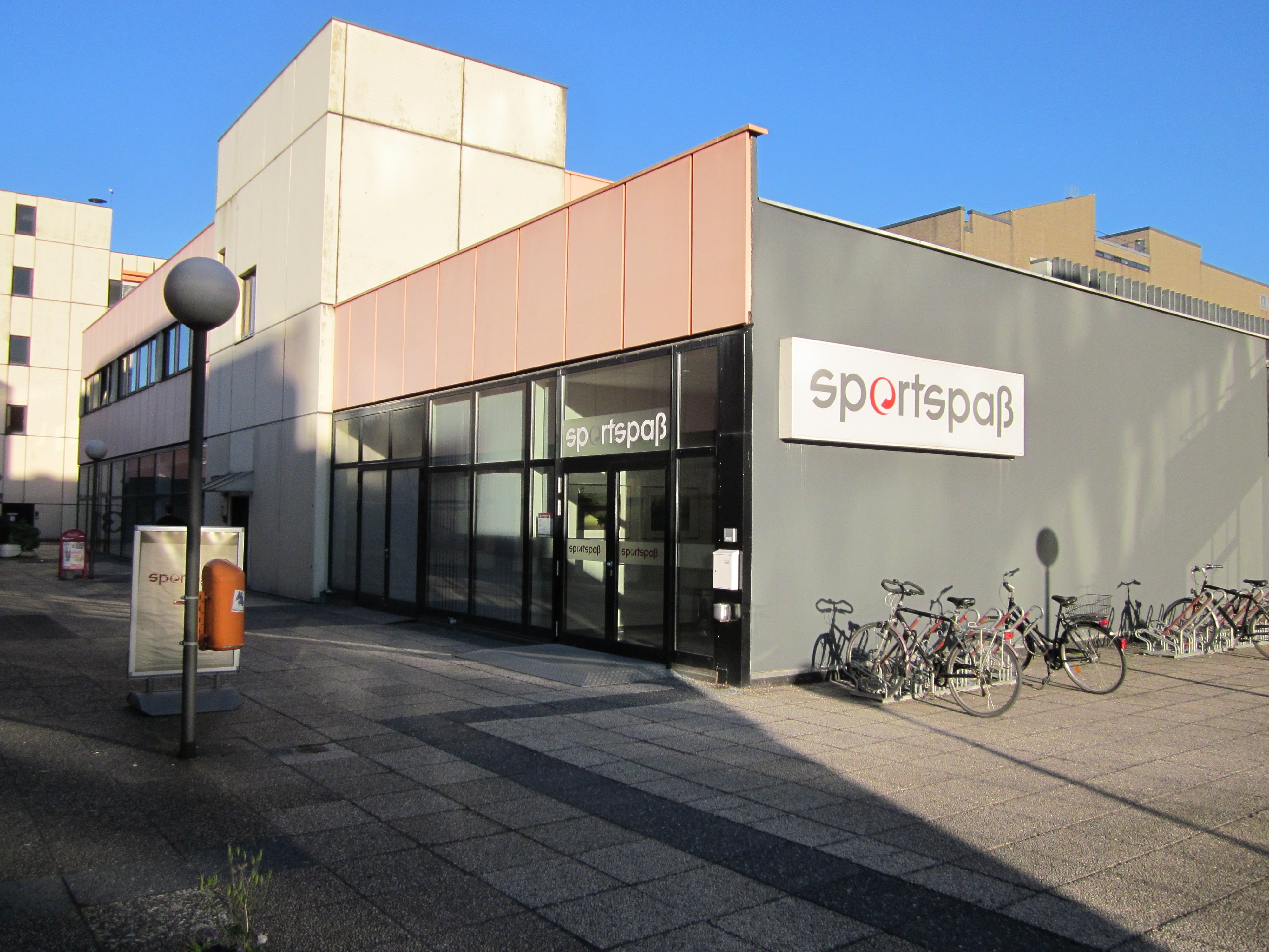 Das Trainingszentrum des Vereins Sportspaß in der City Nord in Winterhude ist eines von fünfen des Vereins und wurde 2009 eingeweiht.